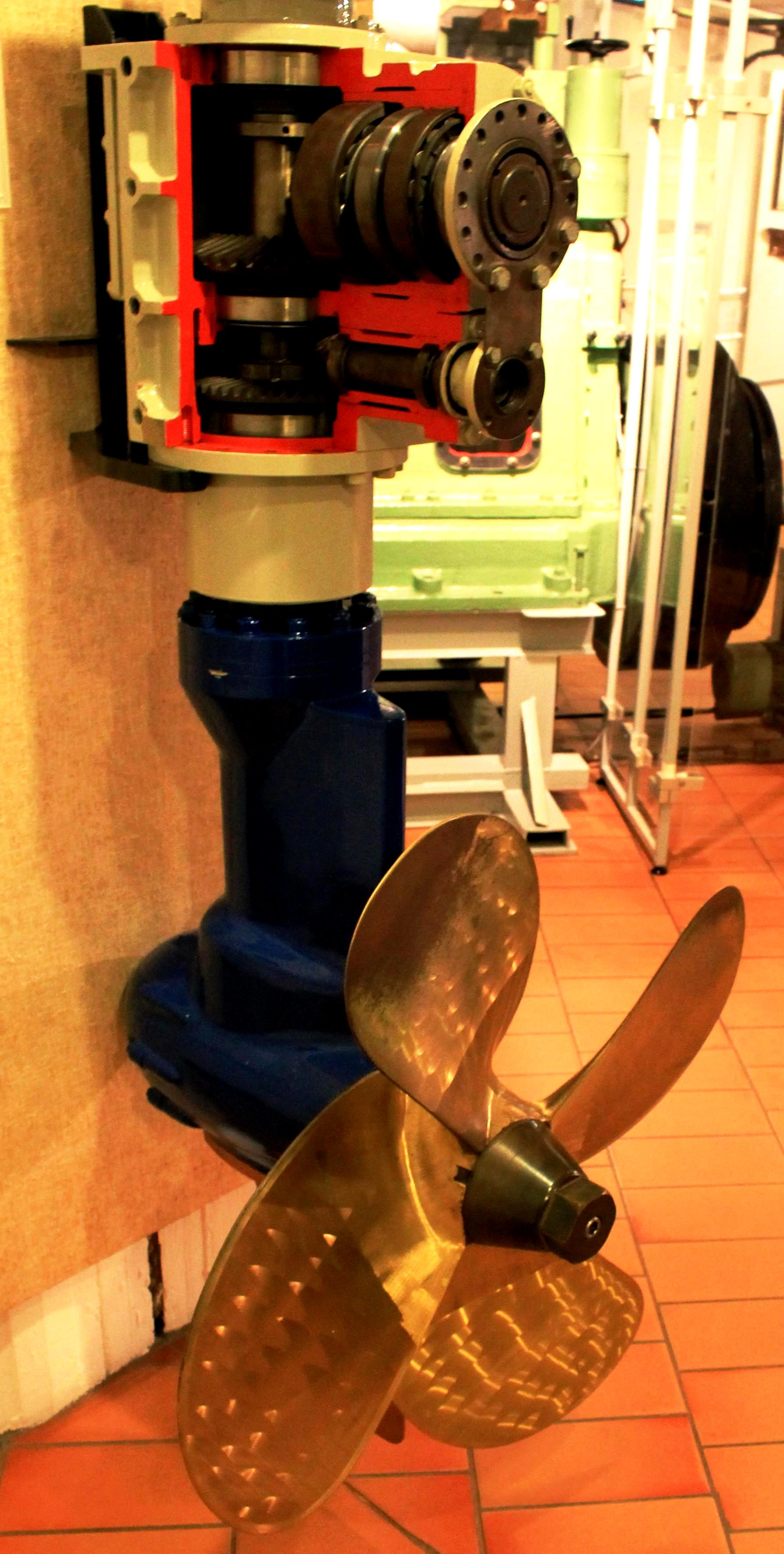 Schottel Ruderpropeller vom Typ SRP 100, ausgestellt im Deutschen Schiffahrtsmuseum (DSM)